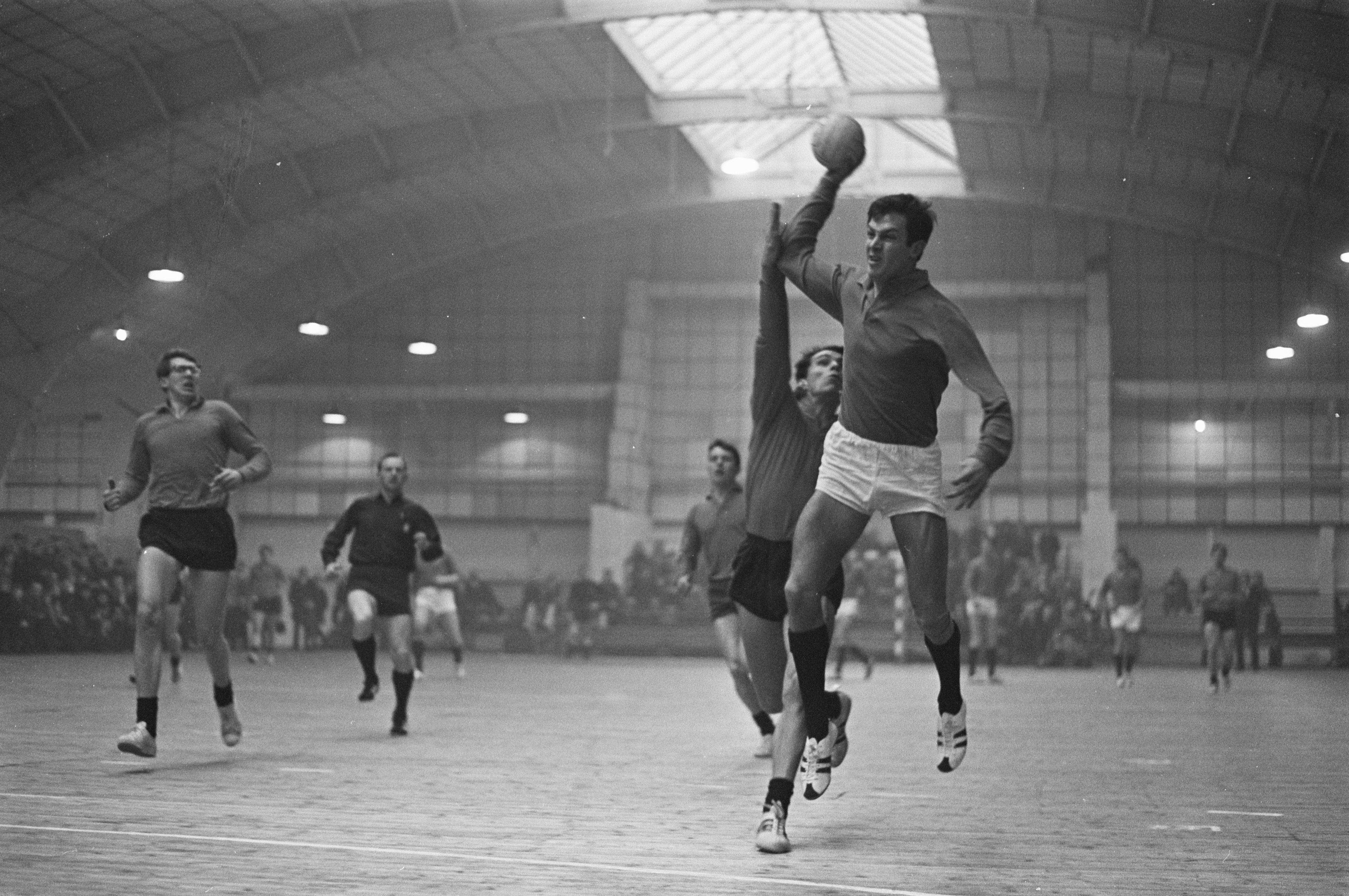 Collectie / Archief : Fotocollectie Anefo Reportage / Serie : [ onbekend ] Beschrijving : Niloc tegen Esca 16-9, zaalhandbal, aanval Esca, links Eddy Hiensch (Niloc) Datum : 15 januari 1967 Trefwoorden : Zaalhandbal Instellingsnaam : Niloc Fotograaf : Steinmeier, Hans / Anefo Auteursrechthebbende : Nationaal Archief Materiaalsoort : Negatief (zwart/wit) Nummer archiefinventaris : bekijk toegang 2.24.01.05 Bestanddeelnummer : 919-9860